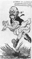 Karikatura bana Slavka Cuvaja (1913-17)